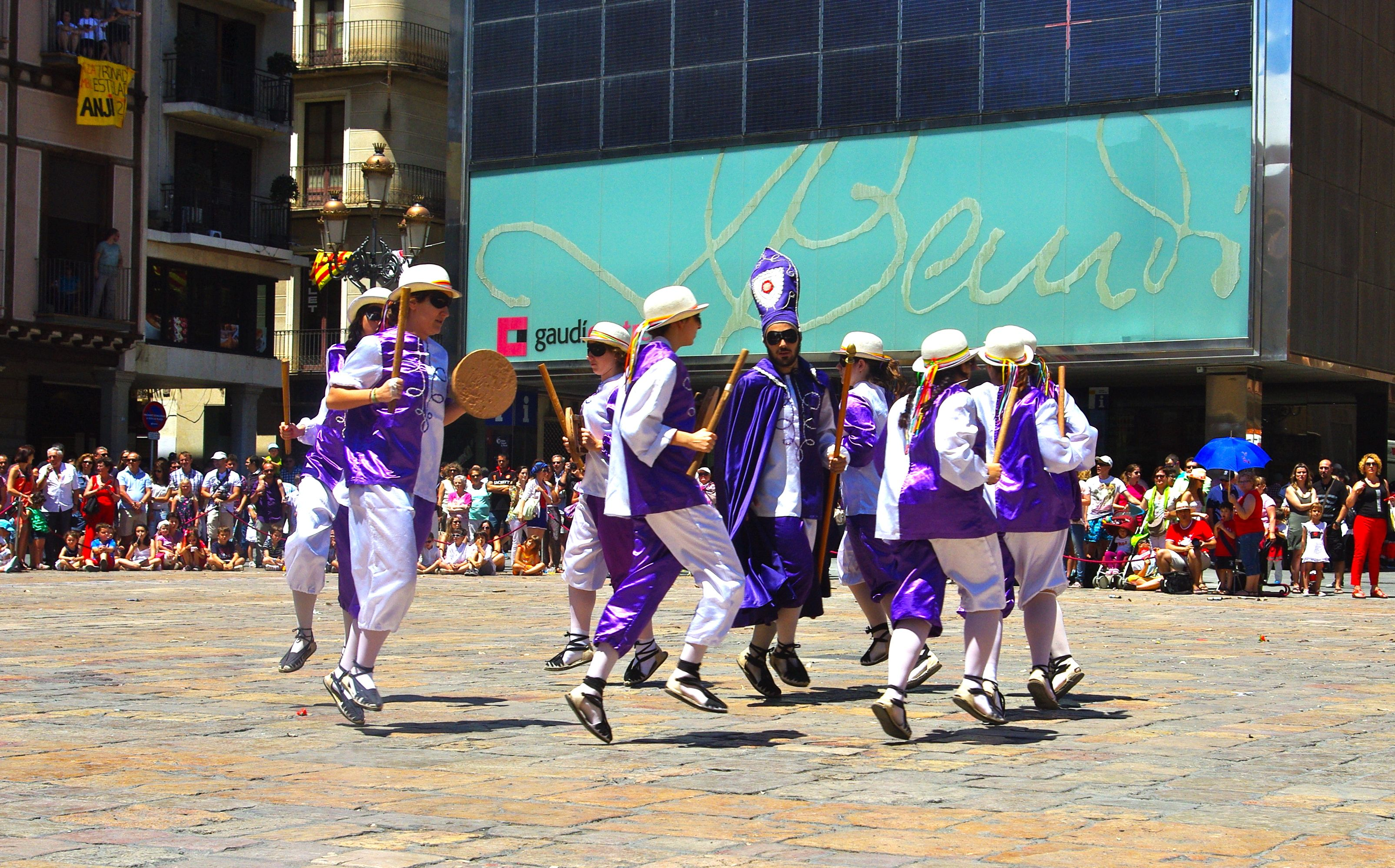 Dansa de Mossen Joan de Vic. Plaça del Mercadal, sant Pere de 2014